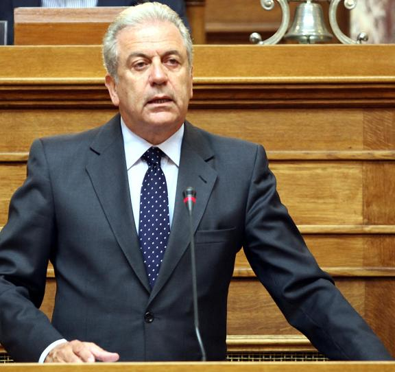 Την Τρίτη 18 Σεπτεμβρίου 2012 ο Υπουργός Εξωτερικών Δ. Αβραμόπουλος ενημέρωσε την Επιτροπή Εθν. Άμυνας και Εξωτερικών Υποθέσεων της Βουλής για θέματα αρμοδιότητάς του.